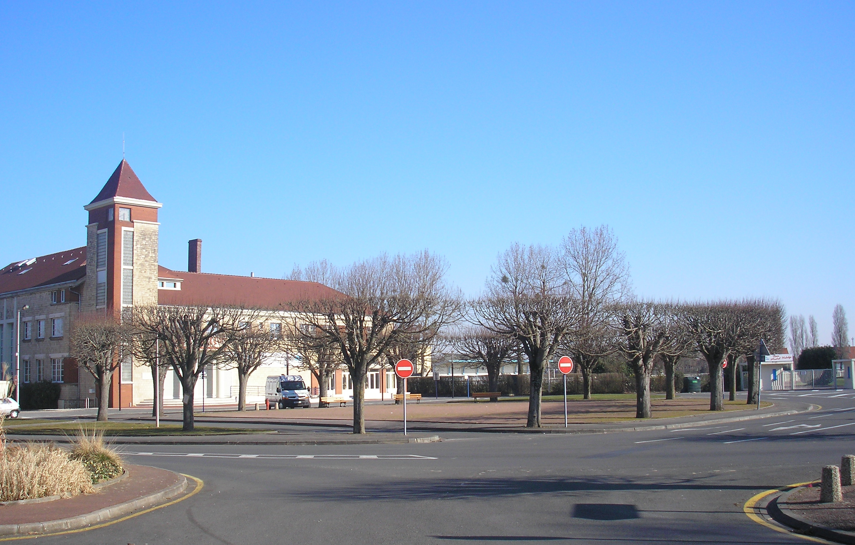 Colombelles (Normandie, France). La place des Tilleuls dans le quartier du Plateau, avec au fond le stade Michel Hidalgo, et à gauche la salle de la Renaissance. L'extrême gauche de la photo est sur la commune de Mondeville.